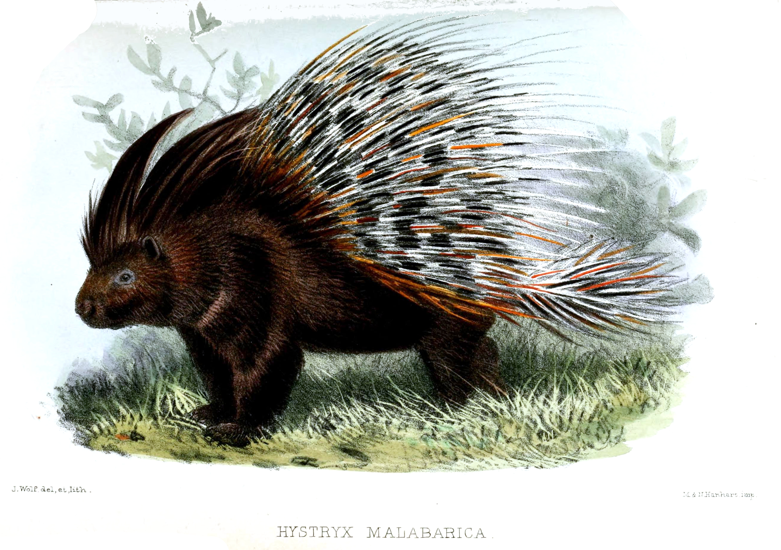 Hystrix malabarica = H. indica